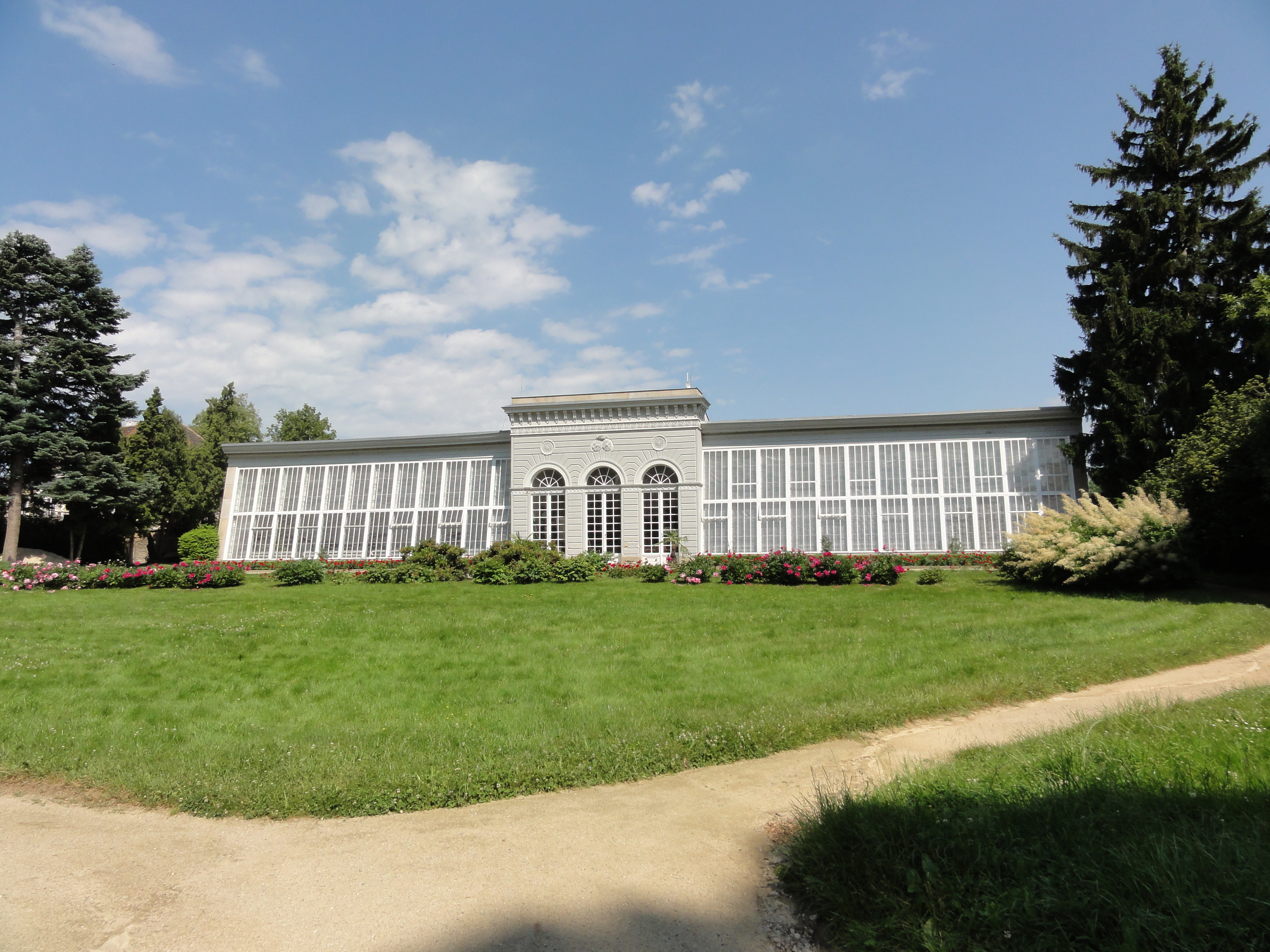 Telč město